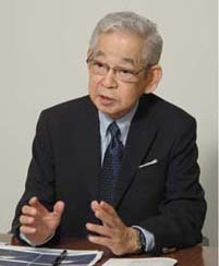 Tatsuji Nomura